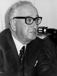 Rosario Asssunto insieme a Giulio Carlo Argan a sx e Cesare Brandi al centro